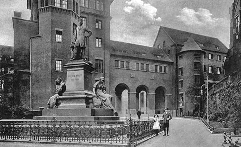 Alfred-Krupp-Denkmal in Essen, mit der Kruppschen Konsumanstalt im Hintergrund